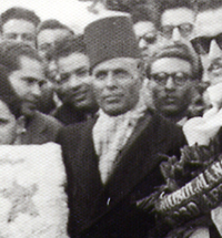 Bourguiba à Paris au milieu des années 1940 (après la deuxième guerre mondiale)